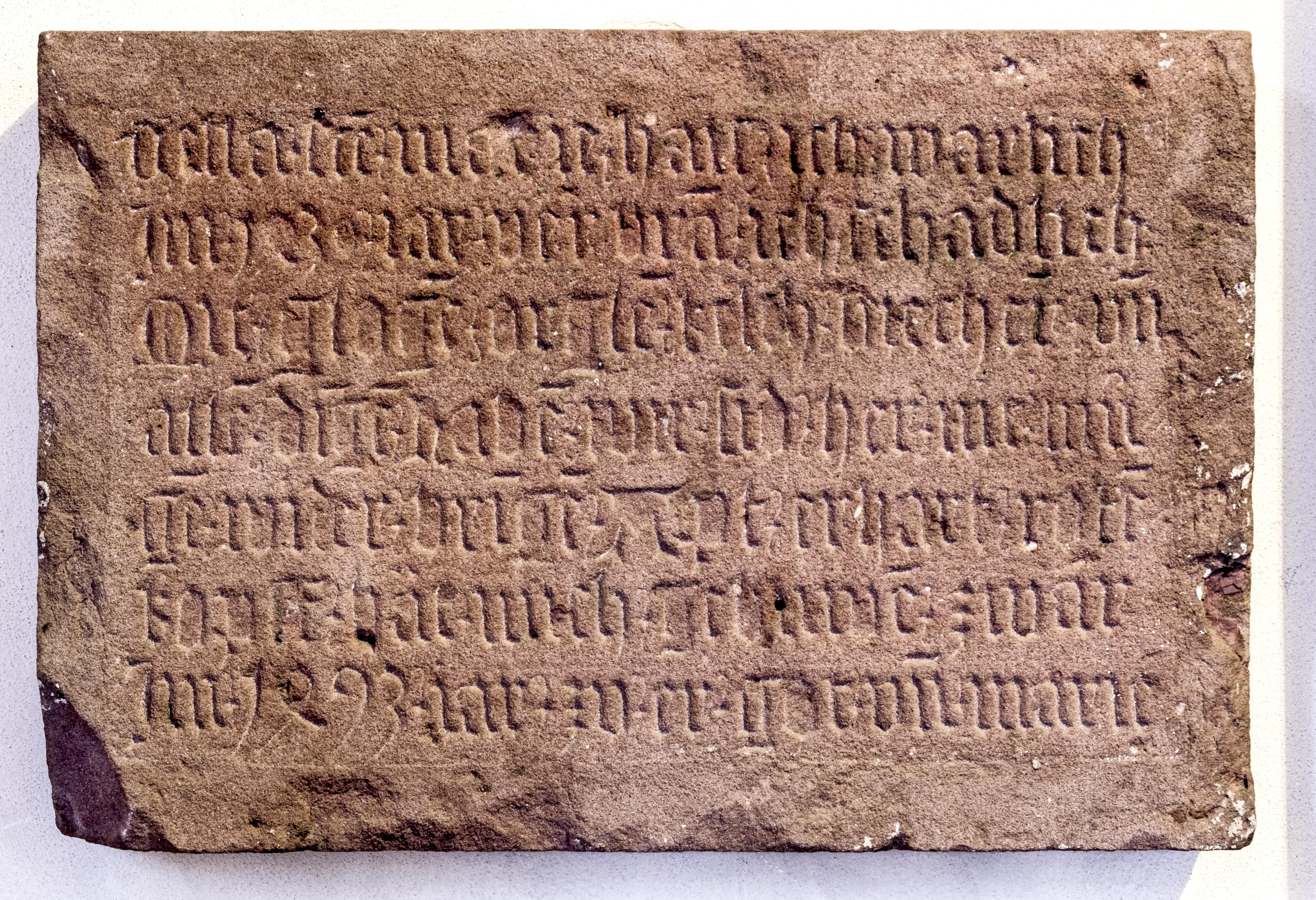 Bilder aus St. Märgen Bilder aus dem Innenraum der Kirche Steintafel links des Eingangs